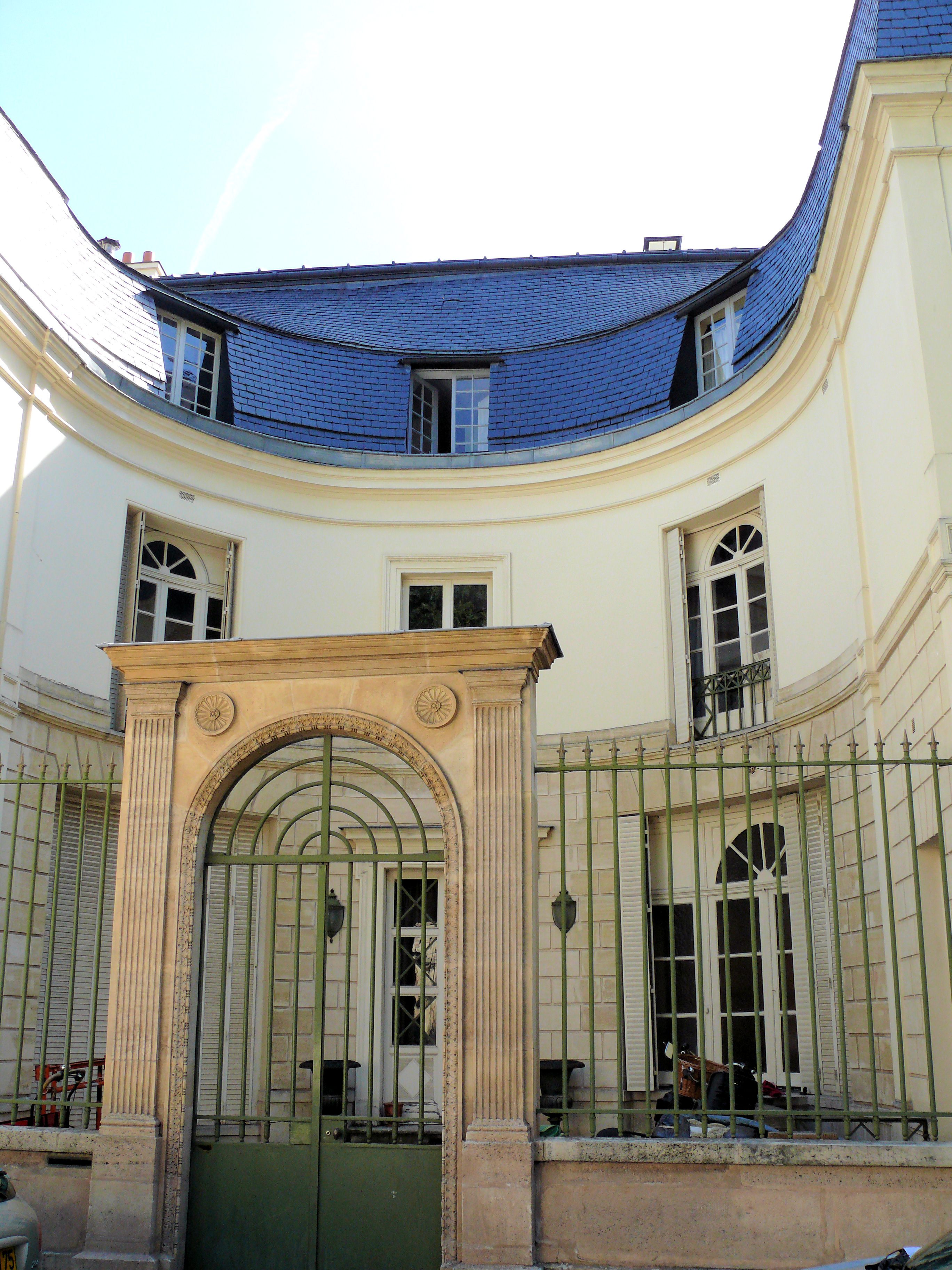 Paris 9ème arrondissement - Hôtel de mademoiselle Duchesnois